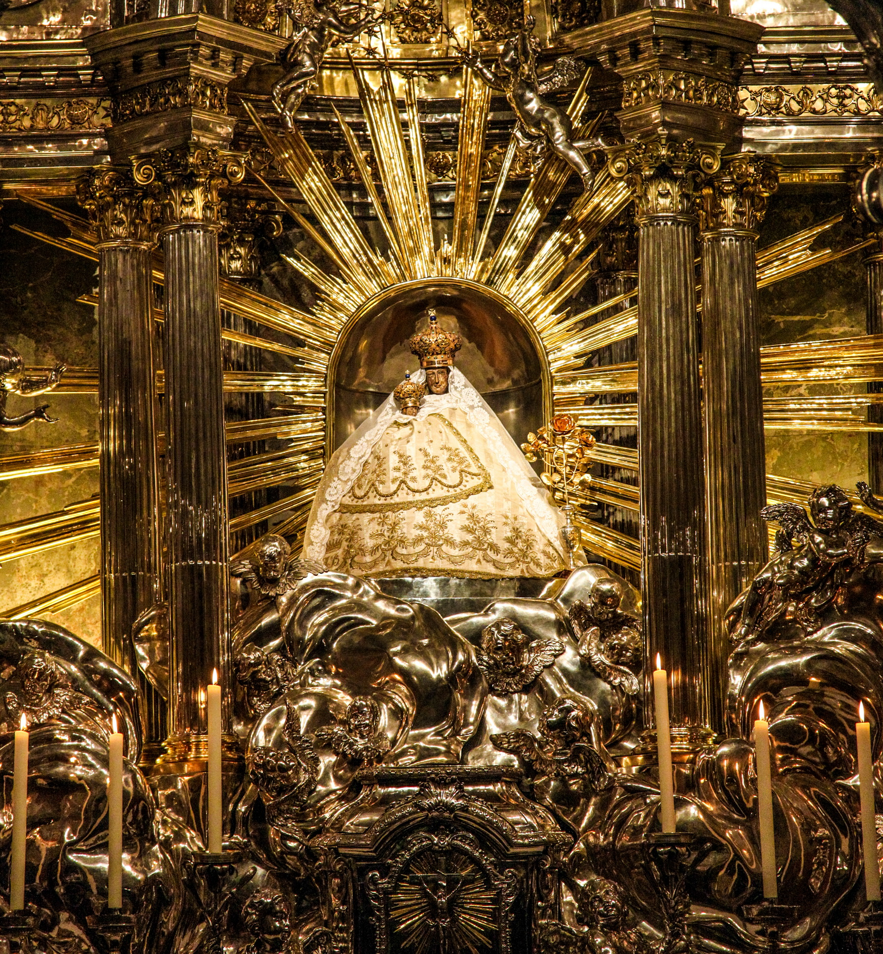 Basilica Minor, Pfarr- und Wallfahrtskirche Maria Geburt mit Kirchhof